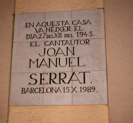 Placa en la casa natal de Joan Manuel Serrat